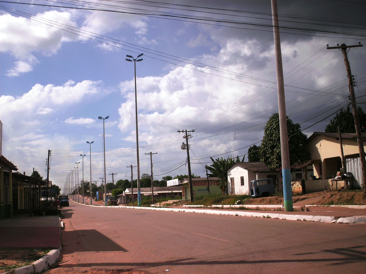 Avenida Ayrton Senna, Rorainópolis, Roraima, Brasil.